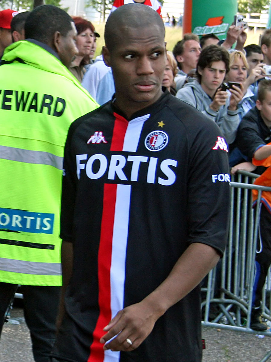 André Bahia (Feyenoord)